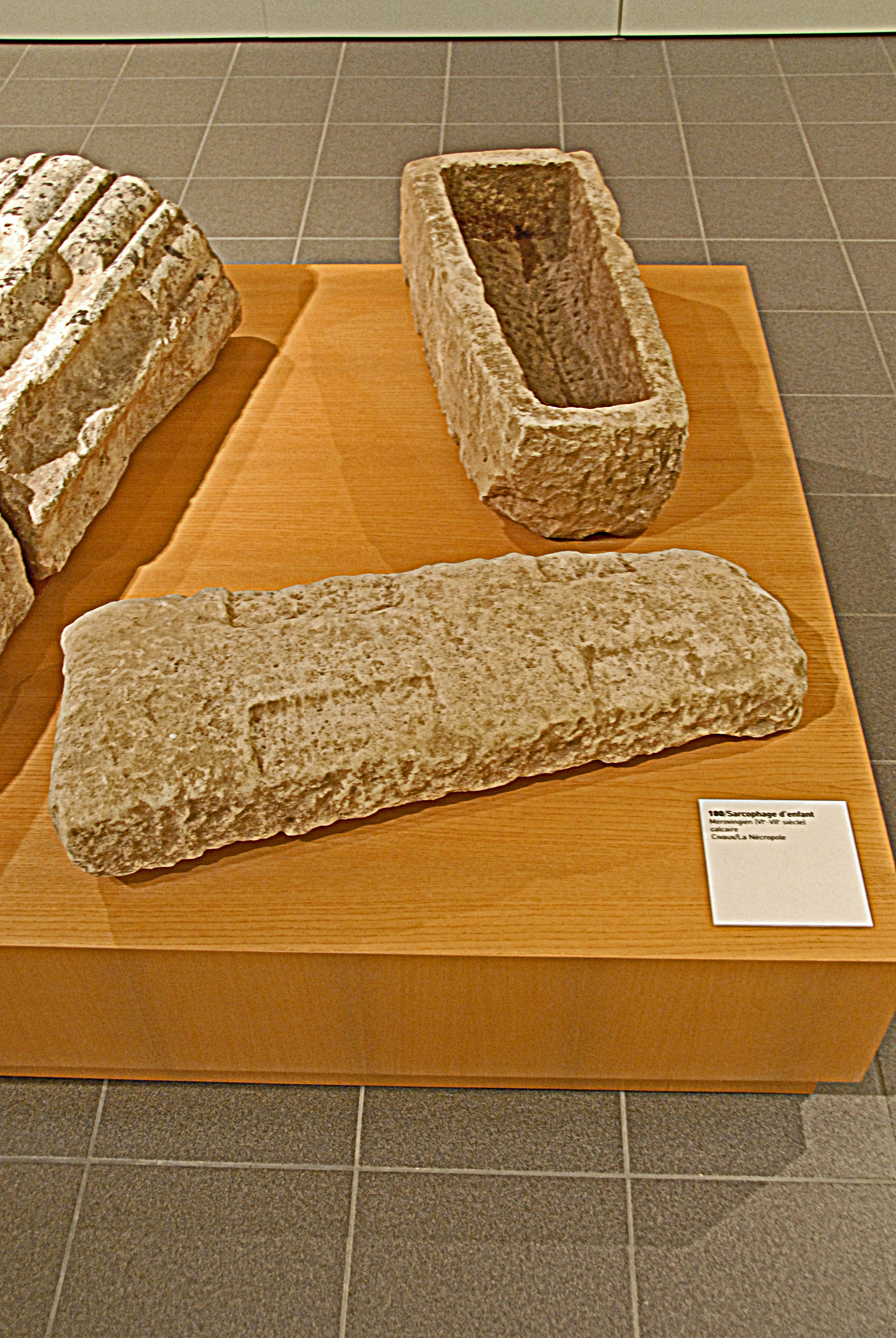 Civaux, Museum, Kindersarkophag 7. Jh.